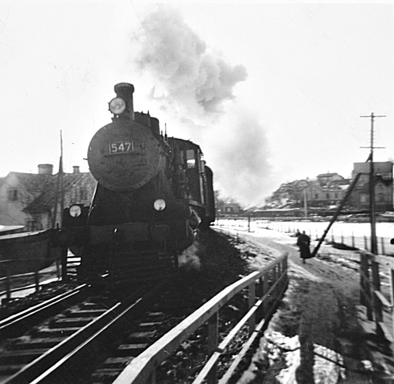 Pikajuna Turusta Helsinkiin kaartaa Aurajoen ylittävälle sillalle veturinaan Hv1 547.